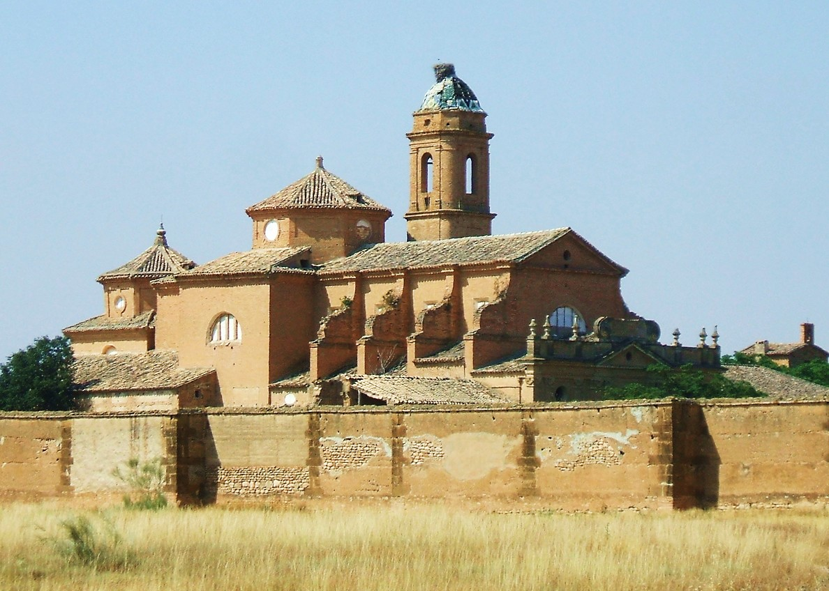 Cartuja de Nuestra Señora de las Fuentes (Cartuja de Monegros), en el término municipal de Sariñena, Huesca, Aragón, España.